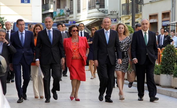 Clemente, Camps, Barberà, Fabra y Blasco.